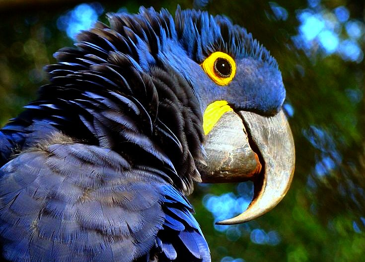 Arara-azul-grande Origem: Wikipédia, a enciclopédia livre. Ir para: navegação, pesquisa Arara-azul-grande Estado de conservação Em perigo Classificação científica Reino: Animalia Filo: Chordata Classe: Aves Ordem: Psittaciformes Família: Psittacidae Género: Anodorhynchus Espécie: A. hyacinthinus Nome binomial Anodorhynchus hyacinthinus (Latham, 1790) A arara-azul-grande (Anodorhynchus hyacinthinus) é uma ave da família Psittacidae, que ocorre nos biomas da Floresta Amazônica e, principalmente, no do Cerrado. Possui uma plumagem azul com uma pele nua amarela em torno dos olhos e fita da mesma cor na base da mandíbula. Seu bico é desmesurado parecendo ser maior que o próprio crânio. Sua alimentação, enquanto vivendo livremente, consiste de sementes de palmeiras (cocos), especialmente o licuri (Attalea phalerata). Essa arara torna-se madura para a reprodução aos 3 anos e sua época reprodutiva ocorre entre janeiro e novembro. Nascem 2 filhotes por vez e a incubação dura cerca de 30 dias. Depois que nascem, as araras-azuis ficam cerca de três meses e meio no ninho, sob o cuidado dos pais, até se aventurarem no primeiro voo. A convivência familiar dura até um ano e meio de idade, quando os filhotes começam a se separar gradativamente dos pais. Pode ser encontrada no Complexo do Pantanal onde projetos de preservação garantiram no ano de 2001 uma população de 3.000 exemplares. Essa ave está atualmente ameaçada de extinção, sendo as principais causas a caça, o comércio clandestino, no qual as aves são capturadas enquanto filhotes, ainda no ninho e a degradação em seu habitat natural através da destruição atrópica. Sua distribuição geográfica é no Brasil. Sua distribuição geográfica no Brasil é nos estados de: Amazonas, Mato Grosso do Sul, Mato Grosso, Pará e Tocantins. Nidifica em ocos de árvore, principalmente árvores de manduvi.